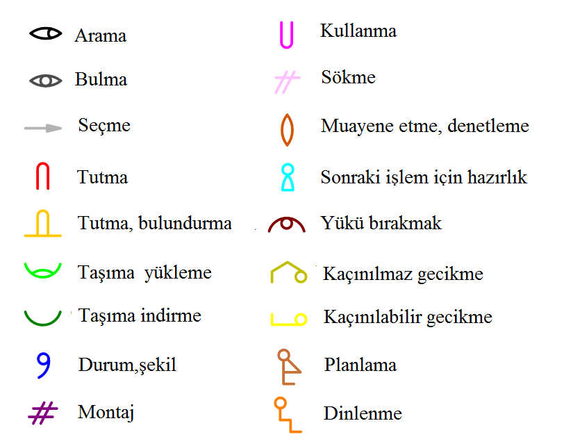 THERBLIG Sembolleri